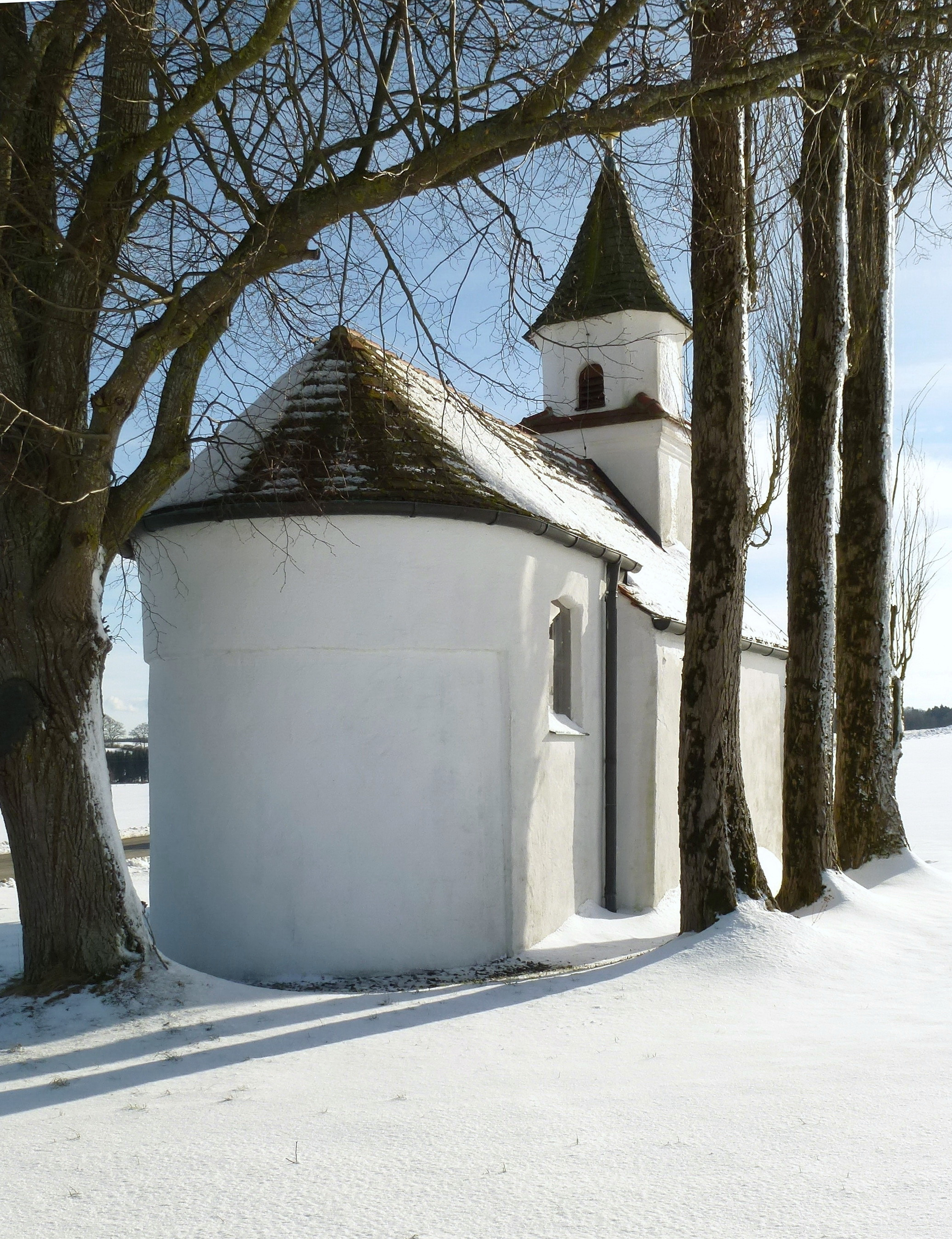 Dießen a.A - OT Dettenschwang Schmiedstr.34 - : Ansicht von NNW